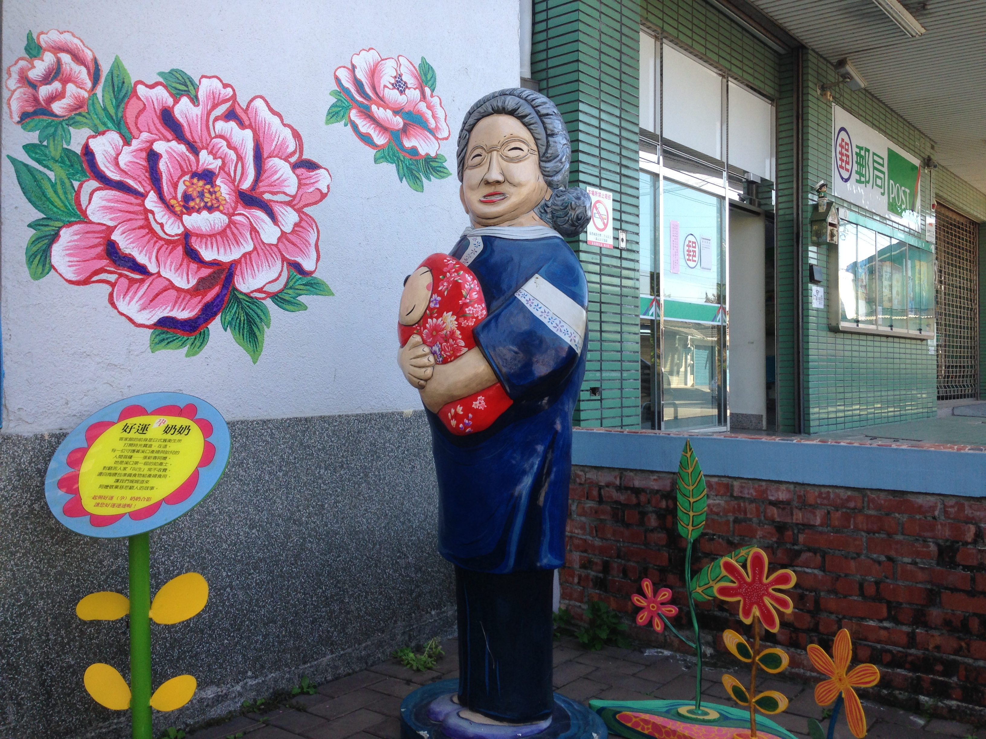 中文（台灣）: 張新春塑像